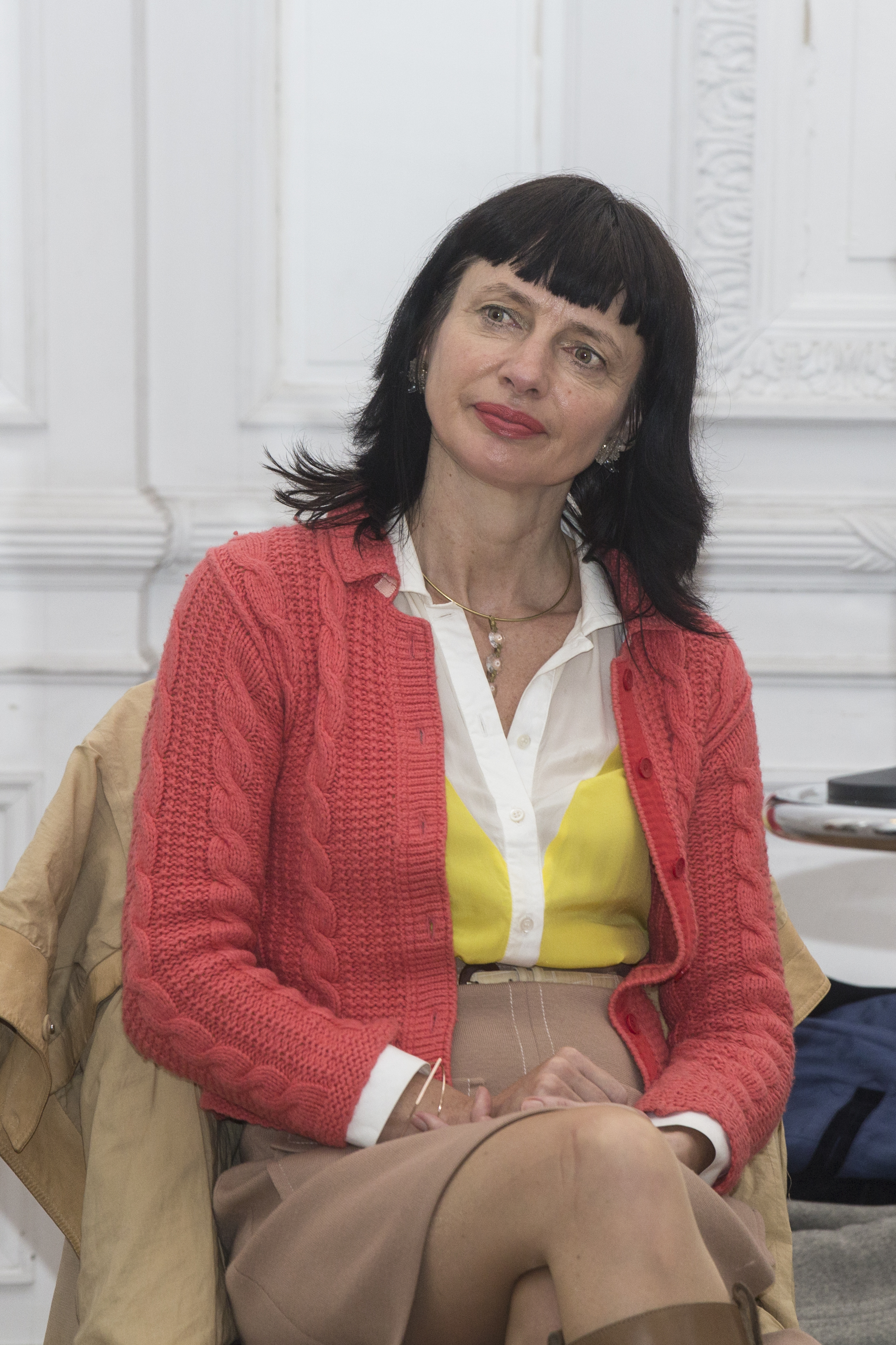 Conversatorio con Carry Somers, creadora de Fashion Revolution UK, en Buenos Aires, 15 de junio de 2017. Diálogos de intercambio para avanzar hacia una moda más sustentable y construir cadenas productivas transparentes, en la Casa Creativa del Sur.